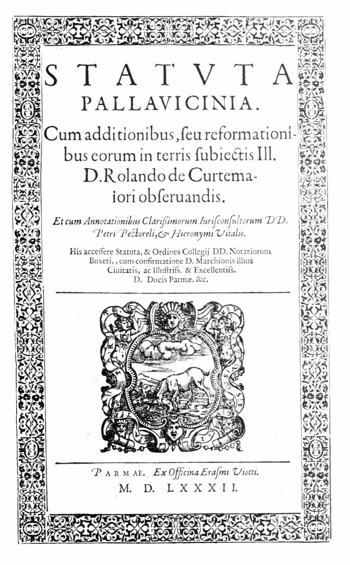 Frontespizio